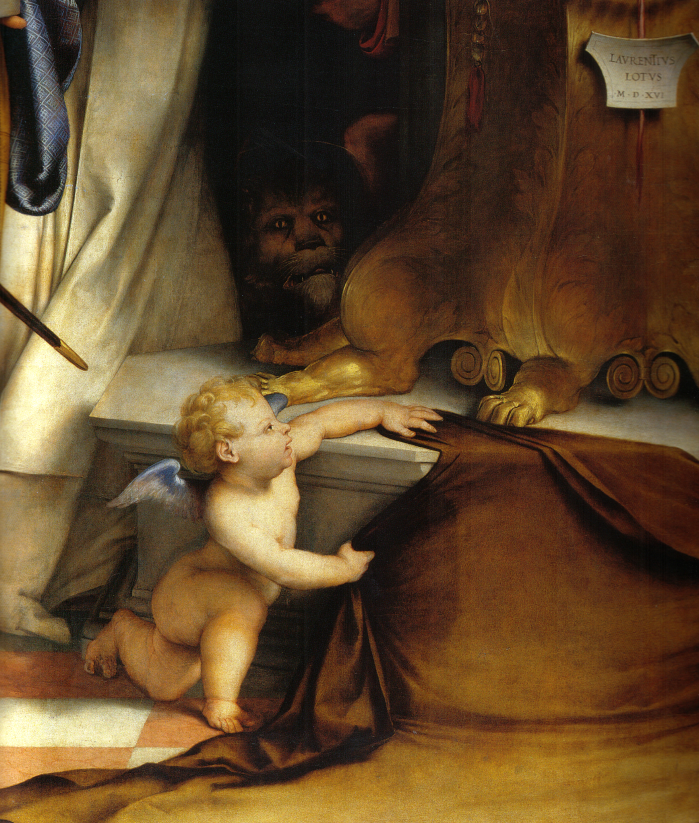 detail